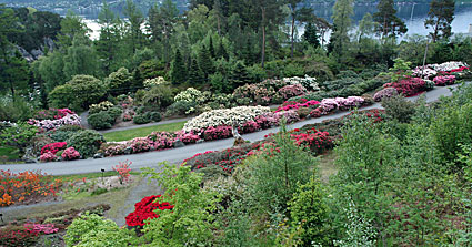 Oversiktsbilde over det meste av Rhododendronkultivarsamlingen i Nydalen. Rhododendronkultivarer er sorter som er krysset fram i planteskoler. Dette er den av rhododendronsamlingene våre som er best kjent, siden vegen inn til Blondehuset og badeplassene går rett gjennom samlingen.